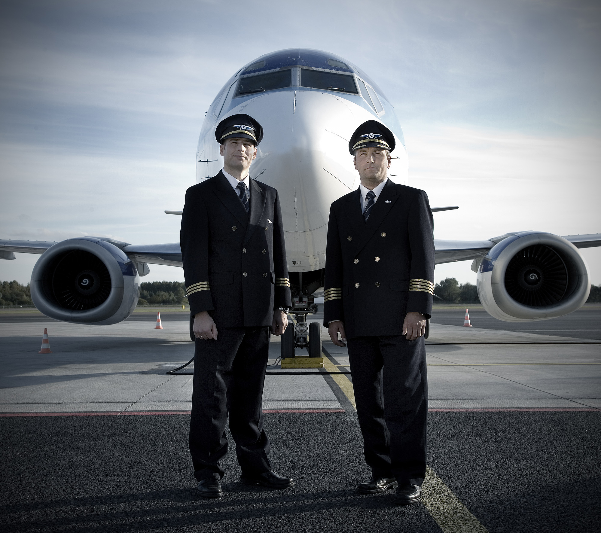 Estonian Airi piloodid.